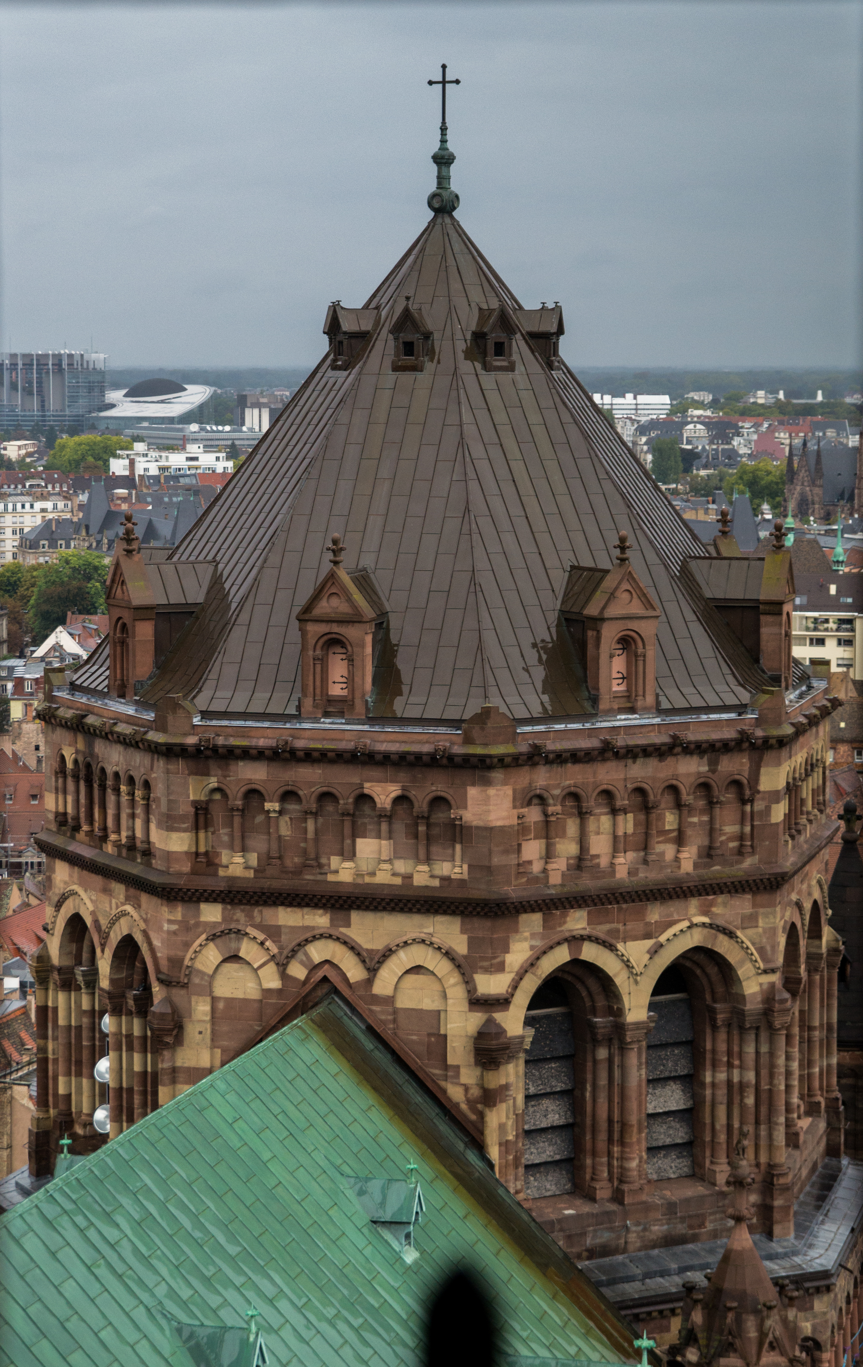 Cathédrale Notre-Damecathédrale .